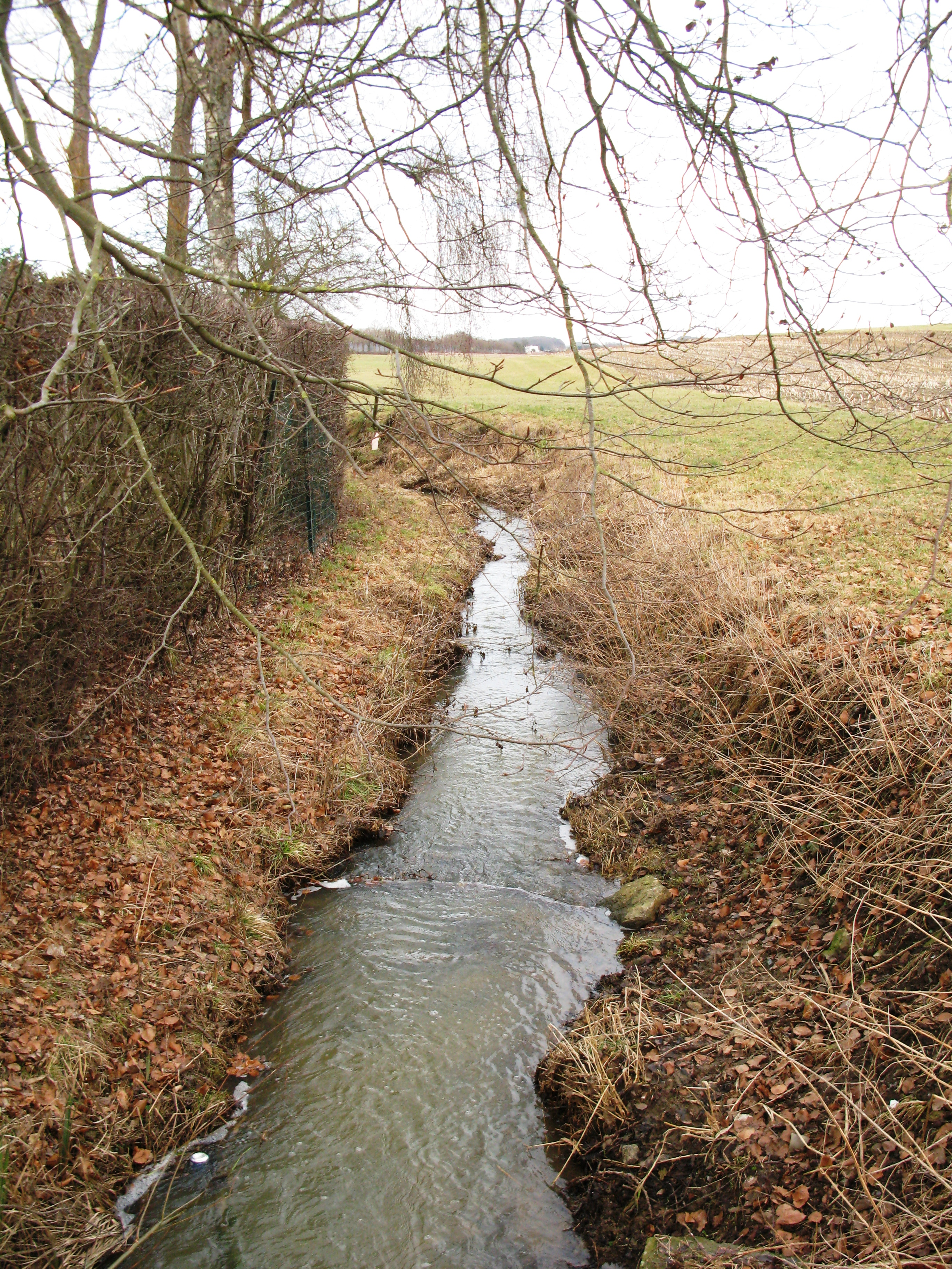 D'Näerdenerbaach vun der Bréck zu Hitten gesinn.